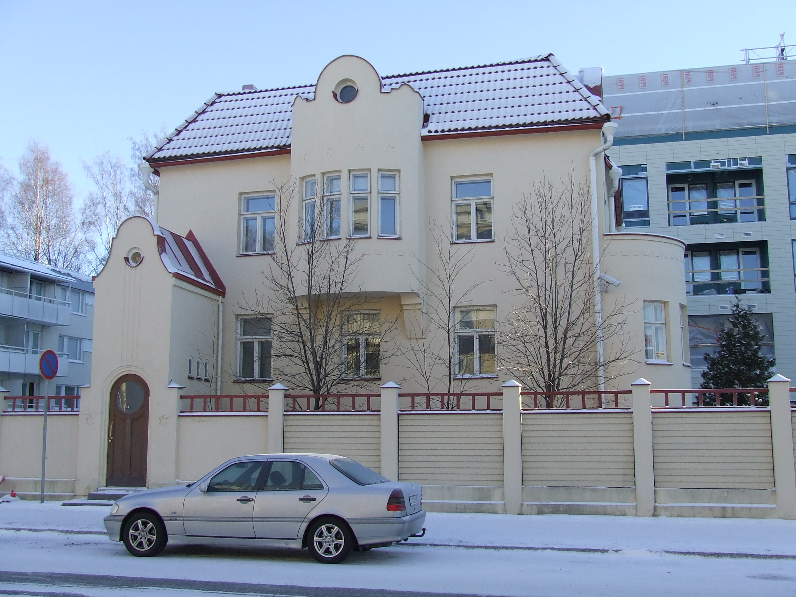 Piparkakkutalo Joensuun Kauppakadulla.